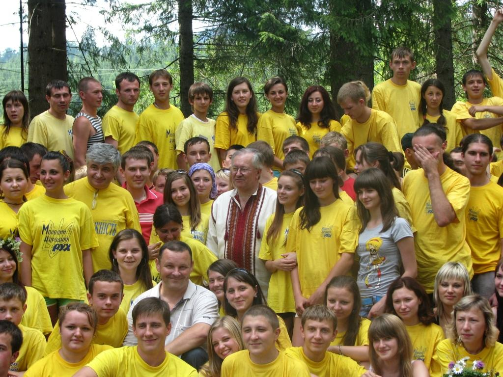 Таборування МНР біля підніжжя г. Говерла